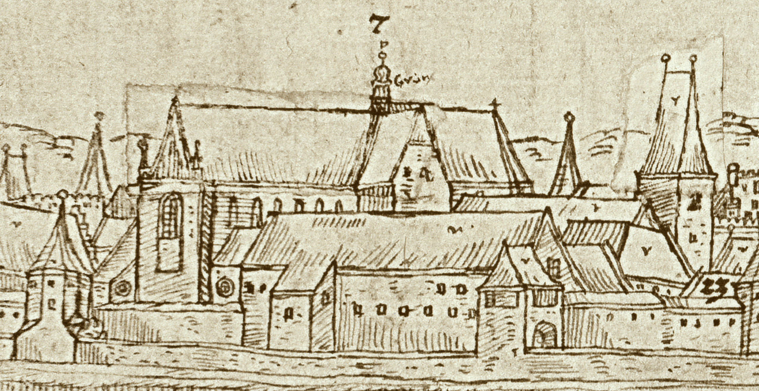 Dominikánský klášter, Bílá věž a opevnění, 1602